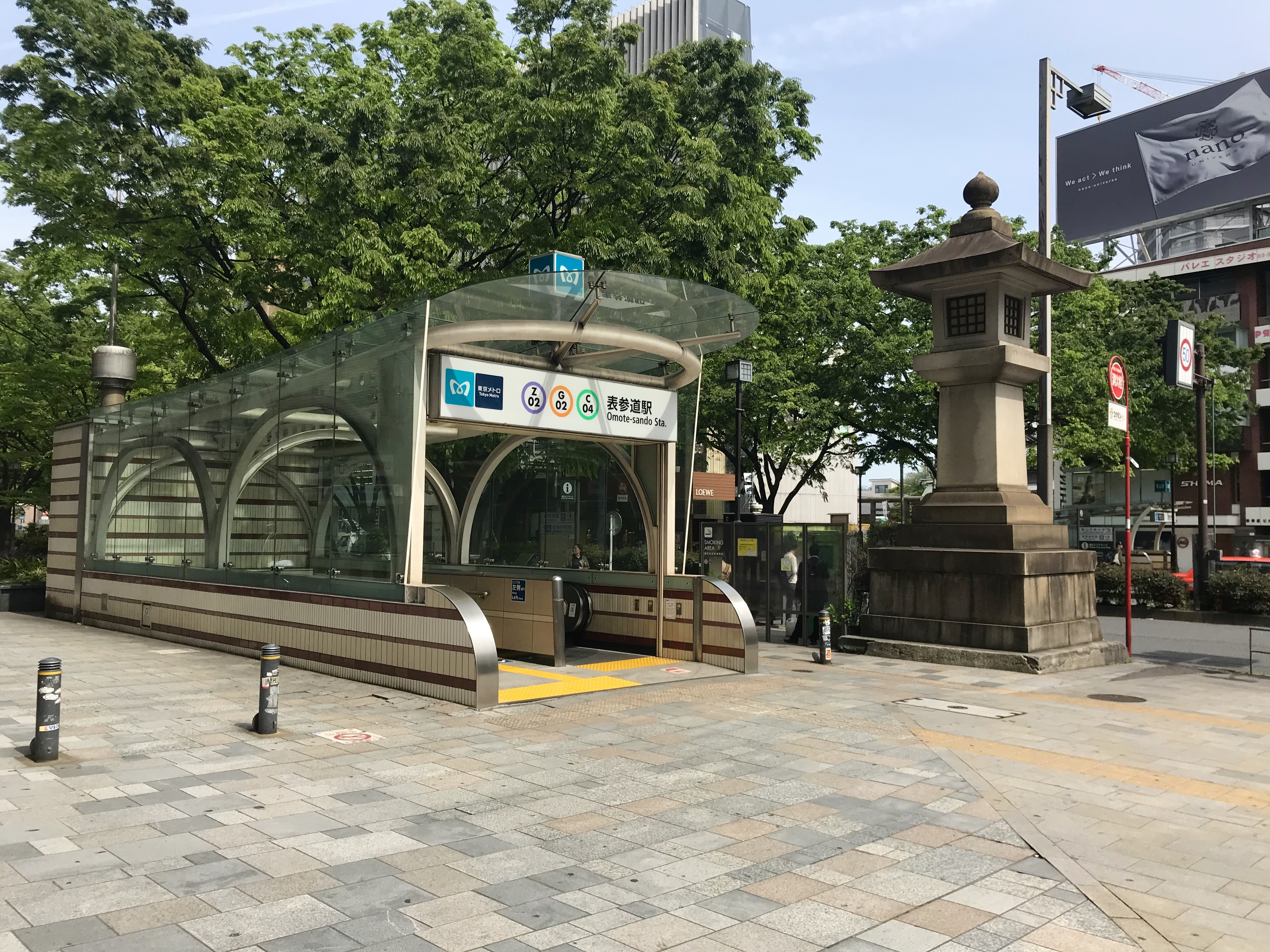 東京メトロ銀座線・千代田線・半蔵門線表参道駅B4番出入口